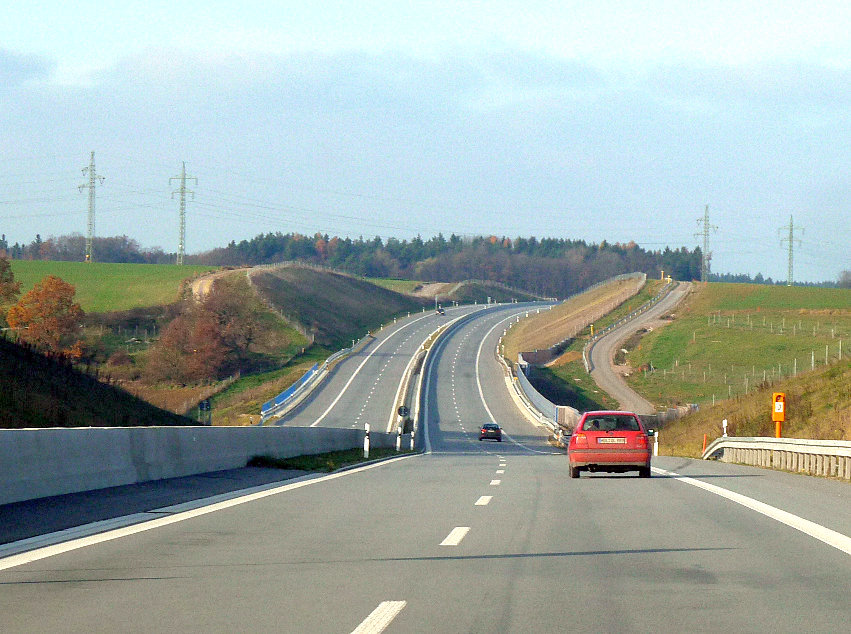 B15 neu in Fahrtrichtung Regensburg - Höhe südliches Ergoldsbach